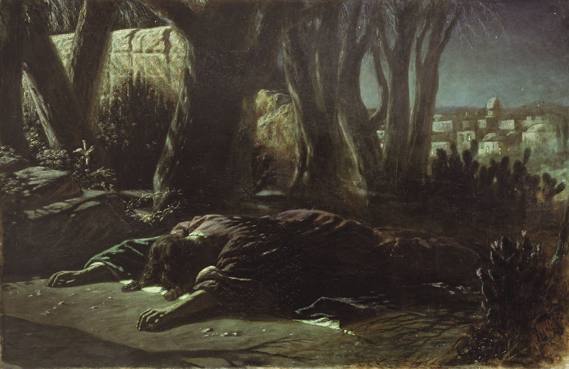 Христос в Гефсиманском саду